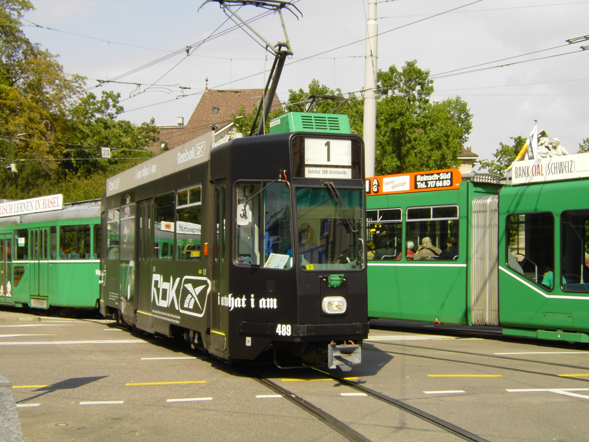 Beschreibung: Straßenbahn der Basler Verkehrs-Betriebe Quelle: selbst aufgenommen Fotograf: CrazyD, 16. Aufgust 2005 Lizenzstatus: GNU FDL Description: tram of the Basler Verkehrs-Betriebe Source: photo was taken by my self Photographer: CrazyD, 16 August 2005 Licence: GNU FDL